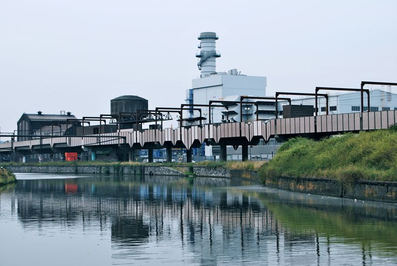 Métro léger de Charleroi : station "Providence" vue depuis les berges de la Sambre.